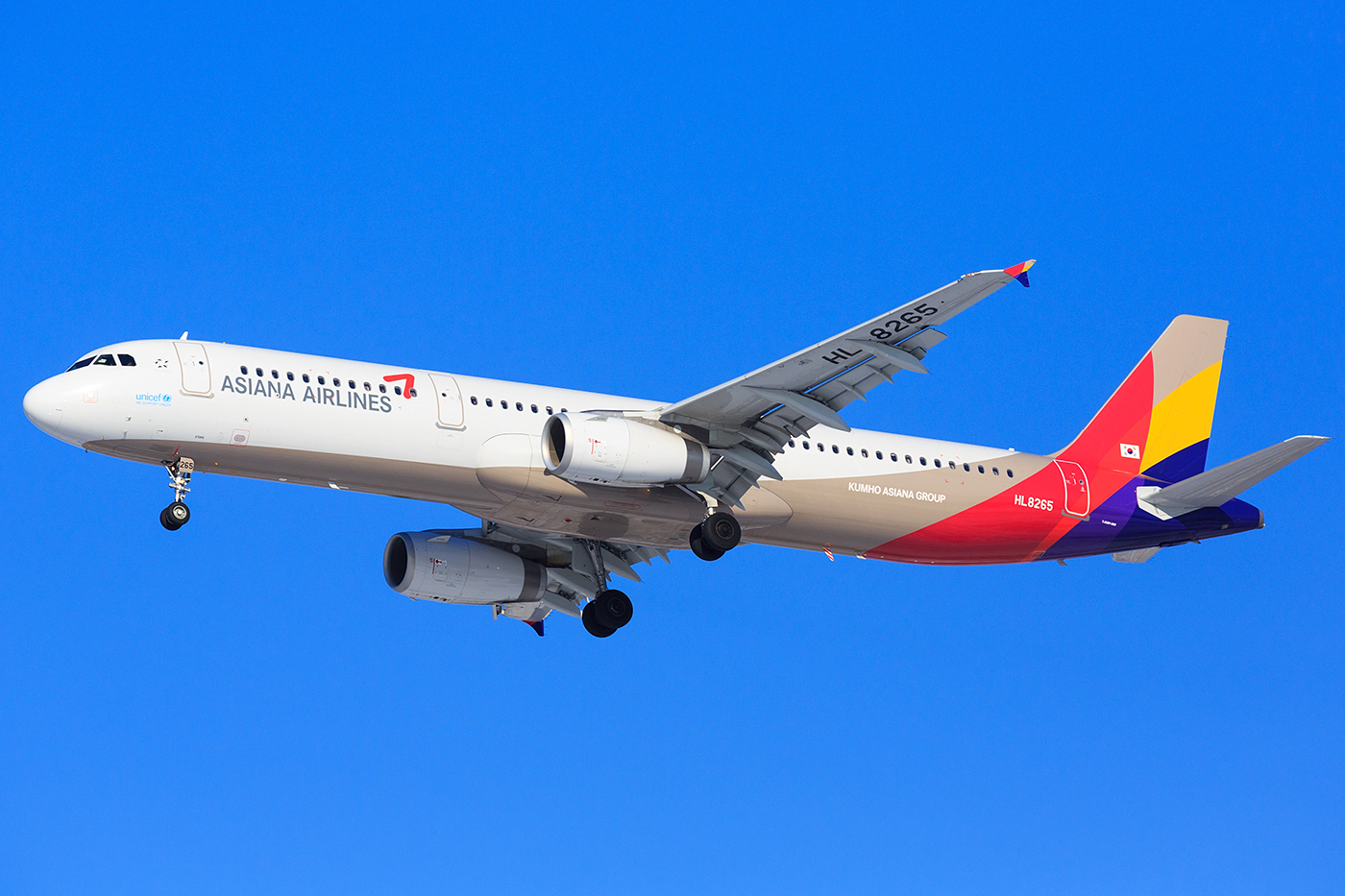 Asiana Airlines Airbus A321 at Vladivostok Airport